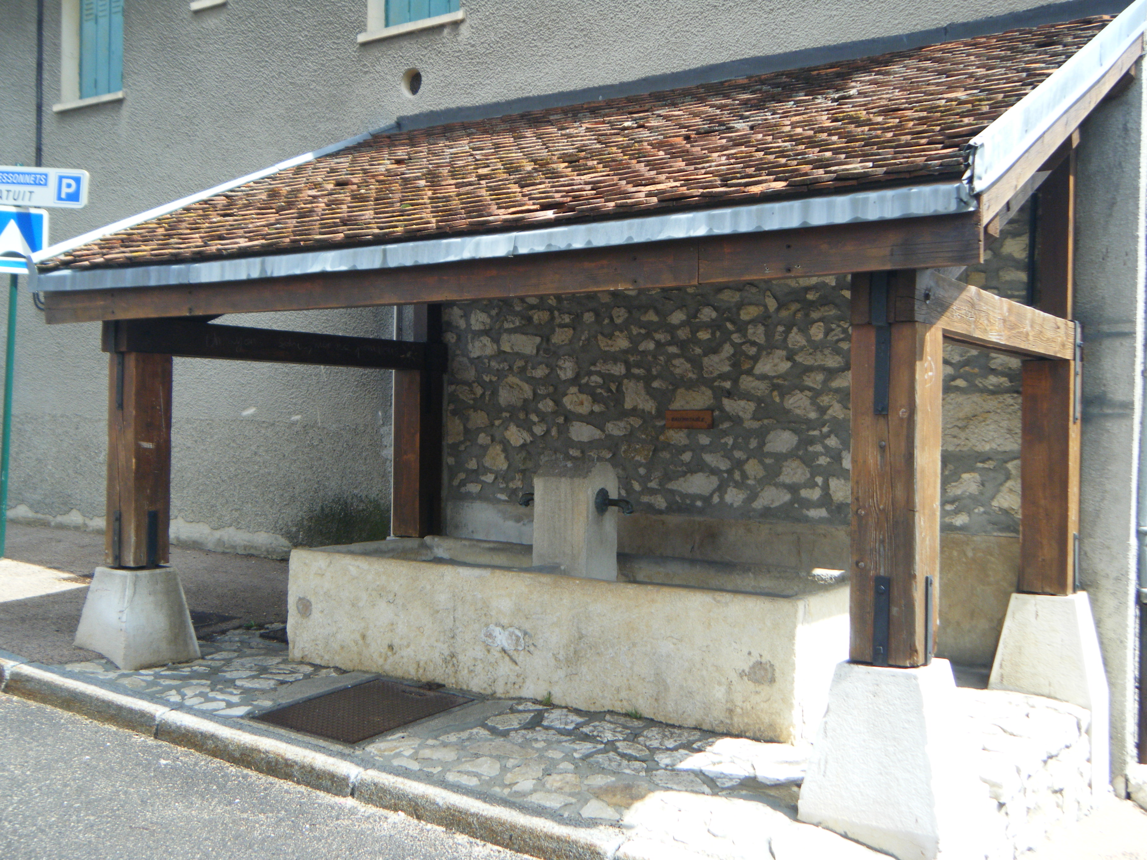 Lavoir de Villard de Lans